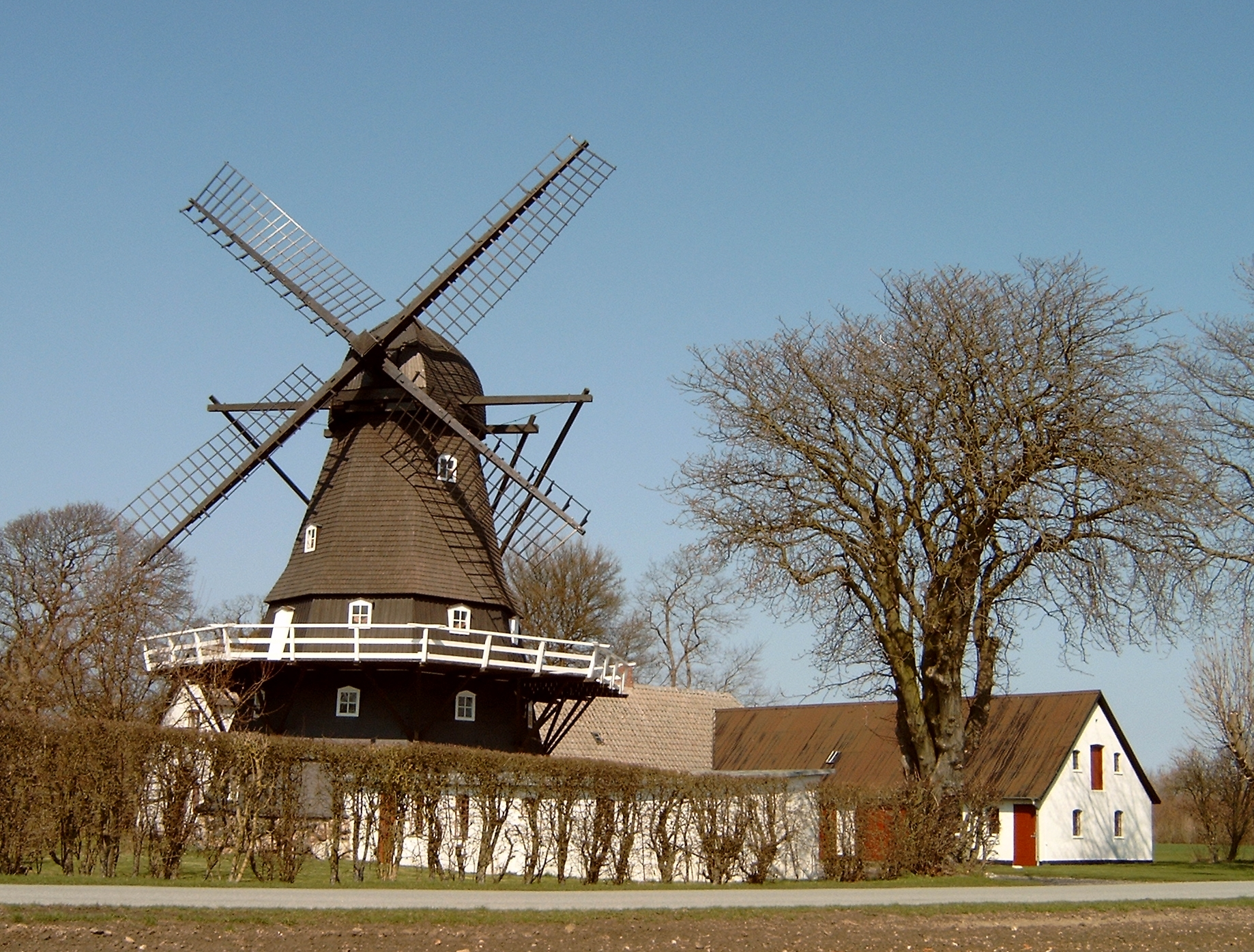 Vindeby Mølle, foto af Per Jensen, som har overdraget rettighederne til mig